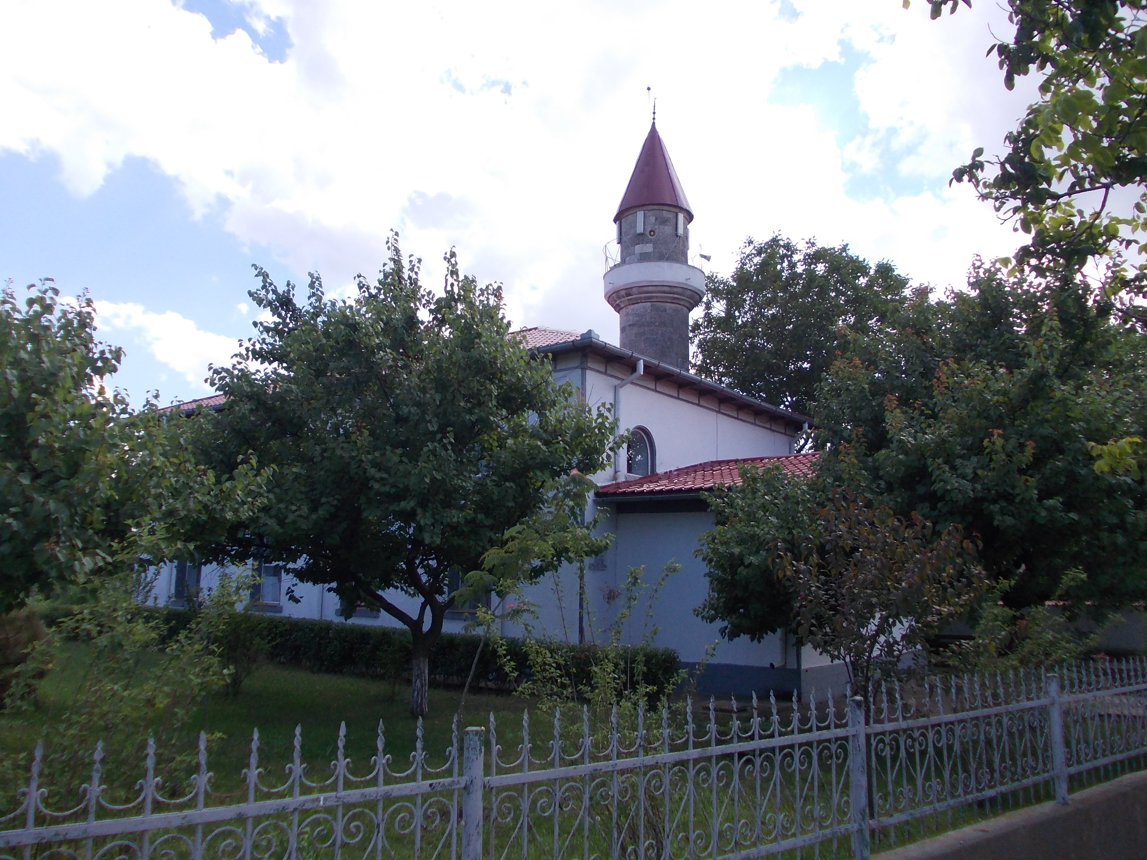 geamia din Techirghiol